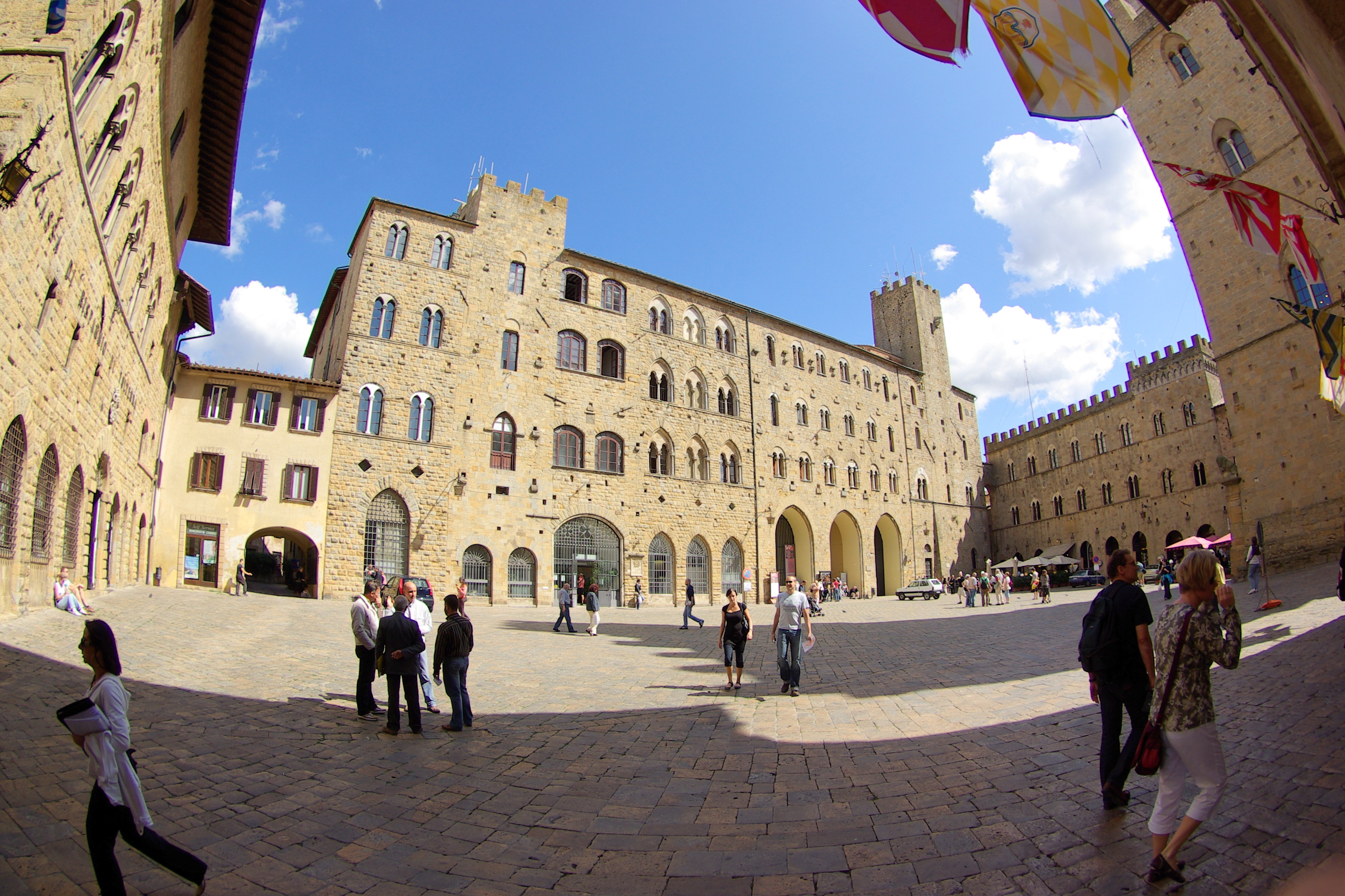 Der Platz im Weitwinkel